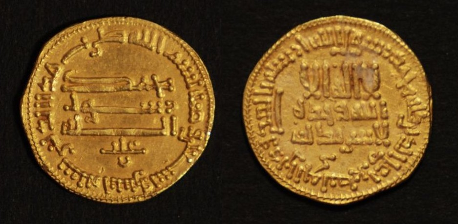 Dinar Aghlabide frappé, sans doute à Kairouan, en 192 H / 808 AD, durant le règne du 1er émir Aghlabide Ibrahim Ier (إبراهيم بن الأغلب). Diamètre:1,9 cm, poids: 4,2 g. Conservé au Musée des arts islamiques, Raqqada, Kairouan, Tunisie.